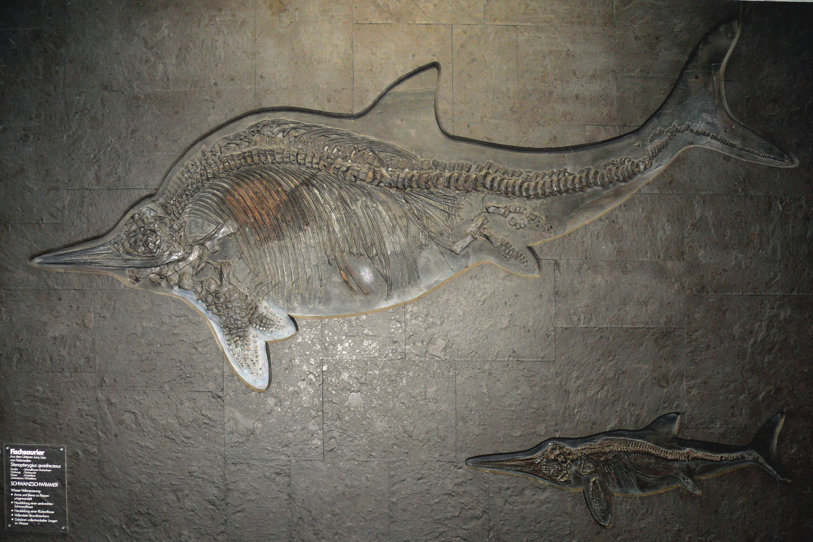 Stenopterygius quadriscissus Adult and juvenile Stenopterygius quadriscissus